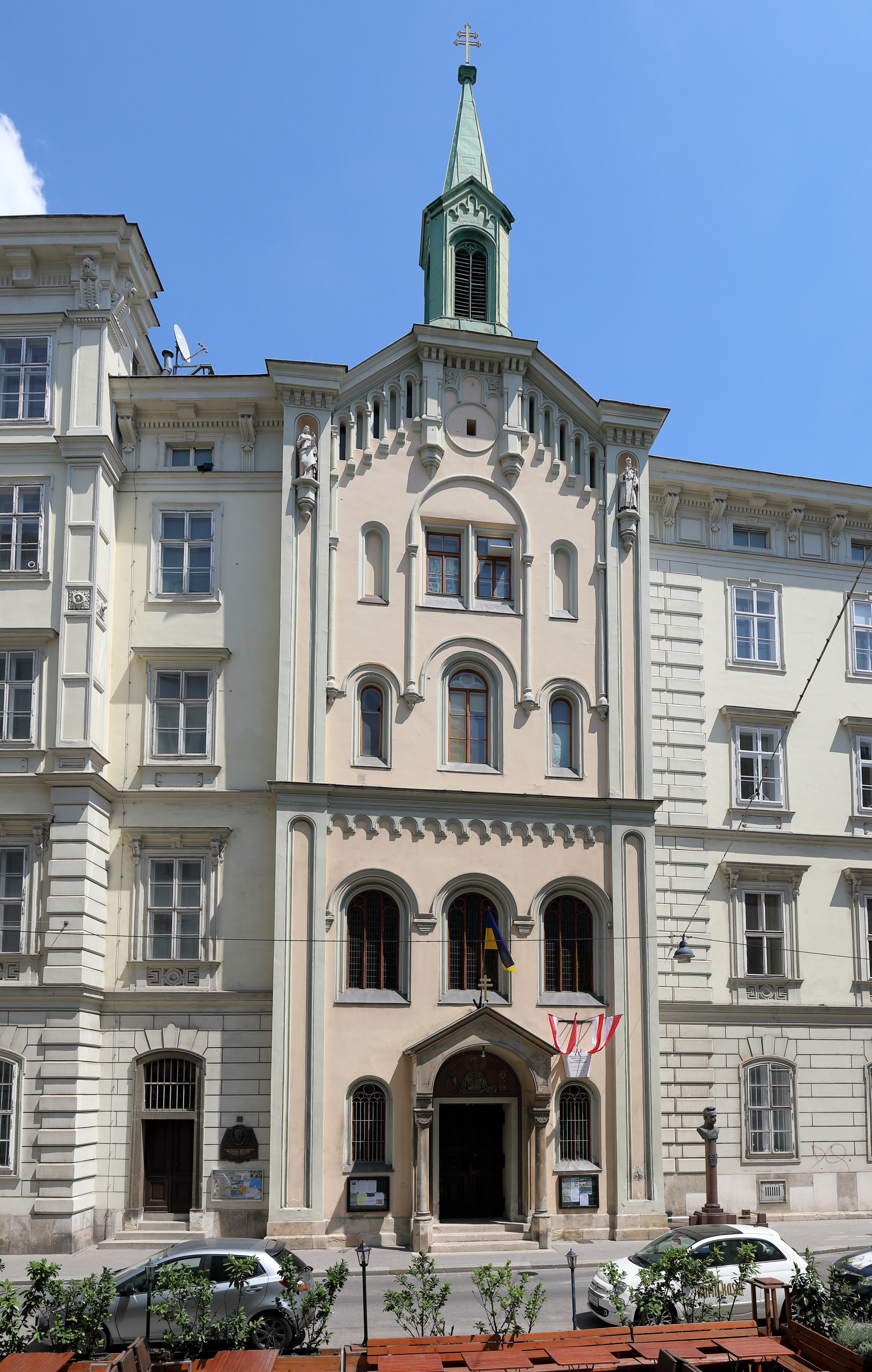 Die ukrainisch-unierte und griechisch-katholische Barbarakirche an der Adresse Postgasse 8A im 1. Wiener Gemeindebezirk Innere Stadt.Die Kirche wurde von 1652 bis 1654 von den Jesuiten errichtet. Nach der Aufhebung des Jesuitenordens (24. Juli 1773) durch Joseph II. und der Schließung des Konvikts stiftete Maria Theresia am 7. Oktober 1775 Konvikt und Kirche der griechisch-katholischen Kirche als Seminar (Barbareum). 1784 wurde das Seminar aufgehoben und eine Pfarre errichtet. Um 1852 wurde die Kirche von Paul Sprenger in den Gebäudekomplex des neu erbauten Hauptpostamtes integriert und neu fassadiert.